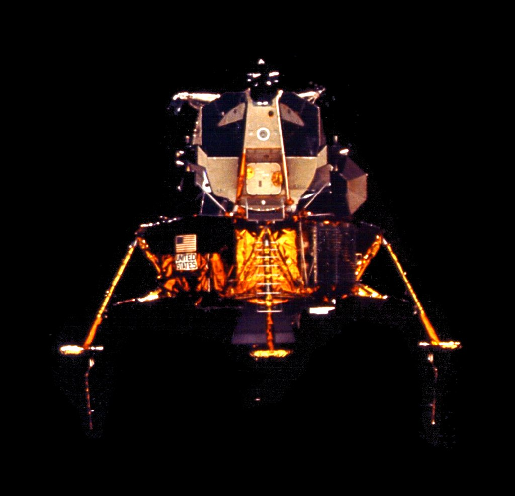 Apollo 16 – Fähre Orion